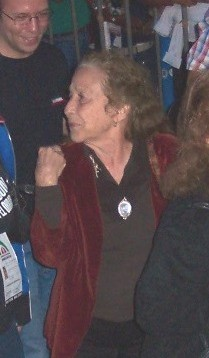 Rosario Ibarra de Piedra al terminar la Convención Nacional Democrática en el zócalo de la Ciudad de México